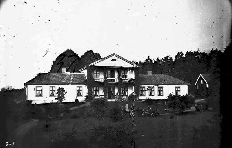 Lystgården Dronninghavn på Bygdøy